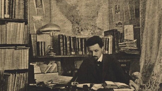 Jiří Klecanda, český legionář, Petrohrad 1913